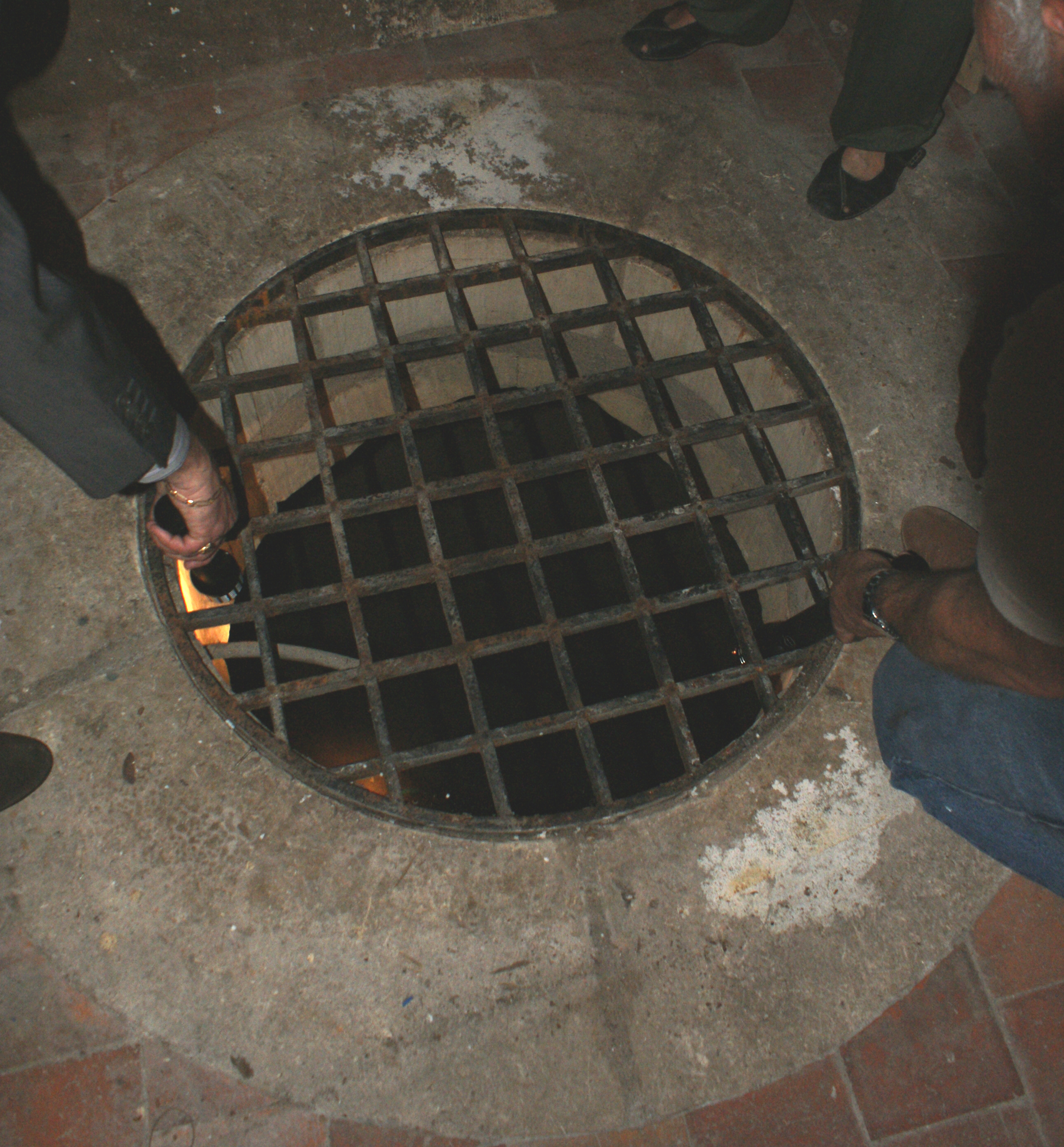 Puits au rez-de-chaussée de la tour du cachot secret, qui aurait pu servir de cachot, au sein du château de Tours qui servit souvent de prison